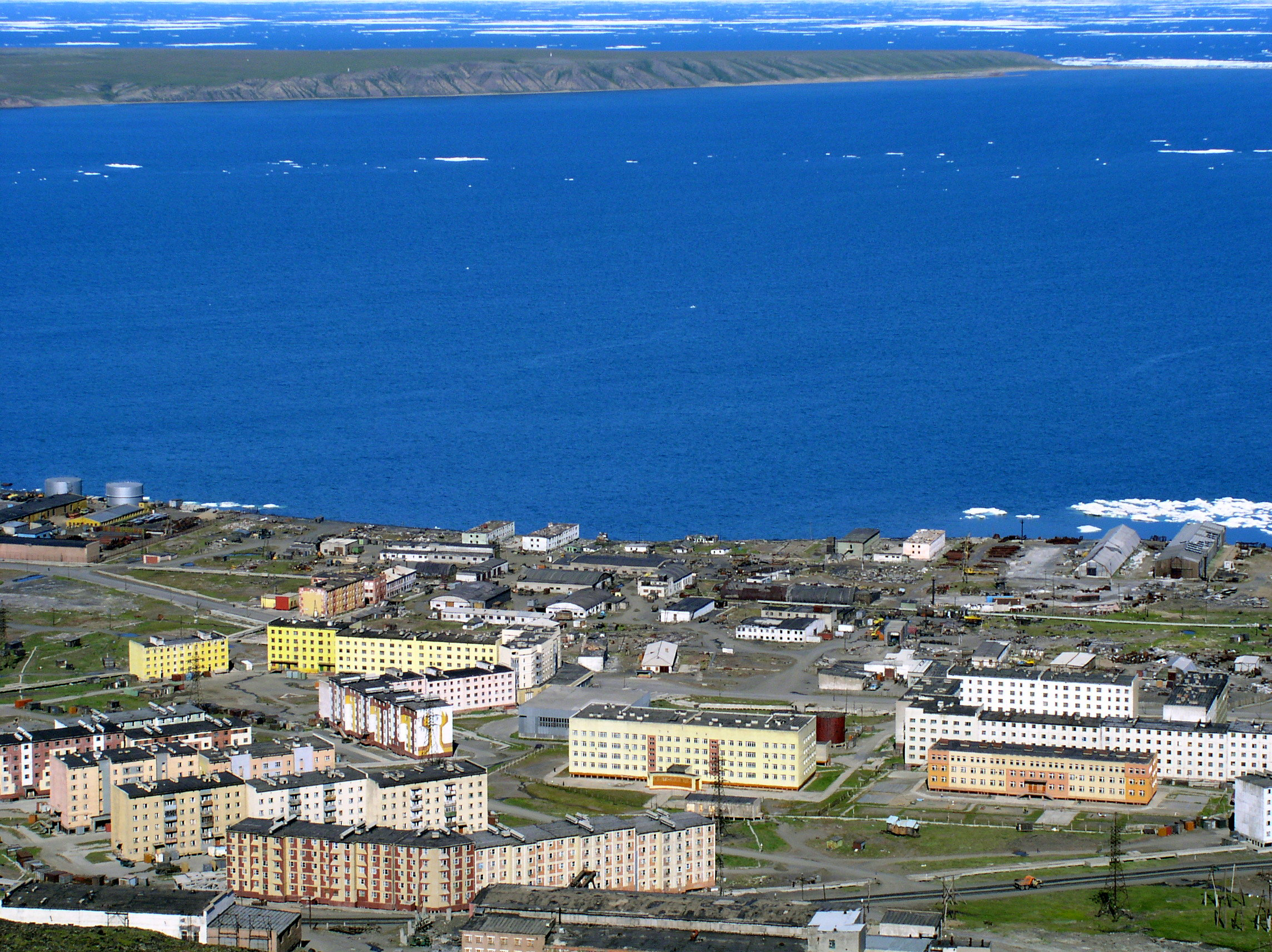 Певек, 5-ый микрорайон